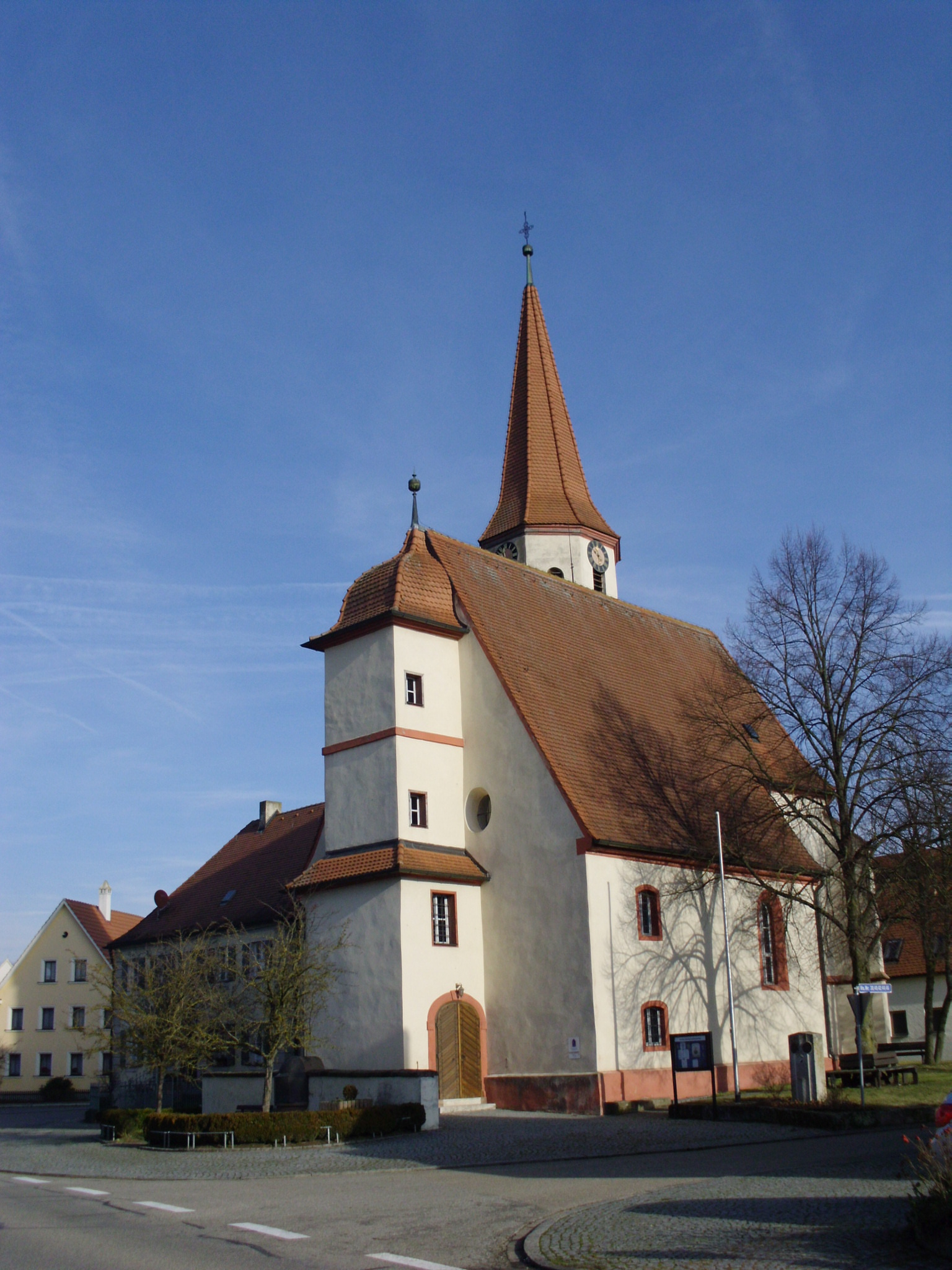 Laubenzedel, Ortsteil von Gunzenhausen im Landkreis Weißenburg-Gunzenhausen (Bayern), Evang.-lutherische PfarrKirche St. Sixtus